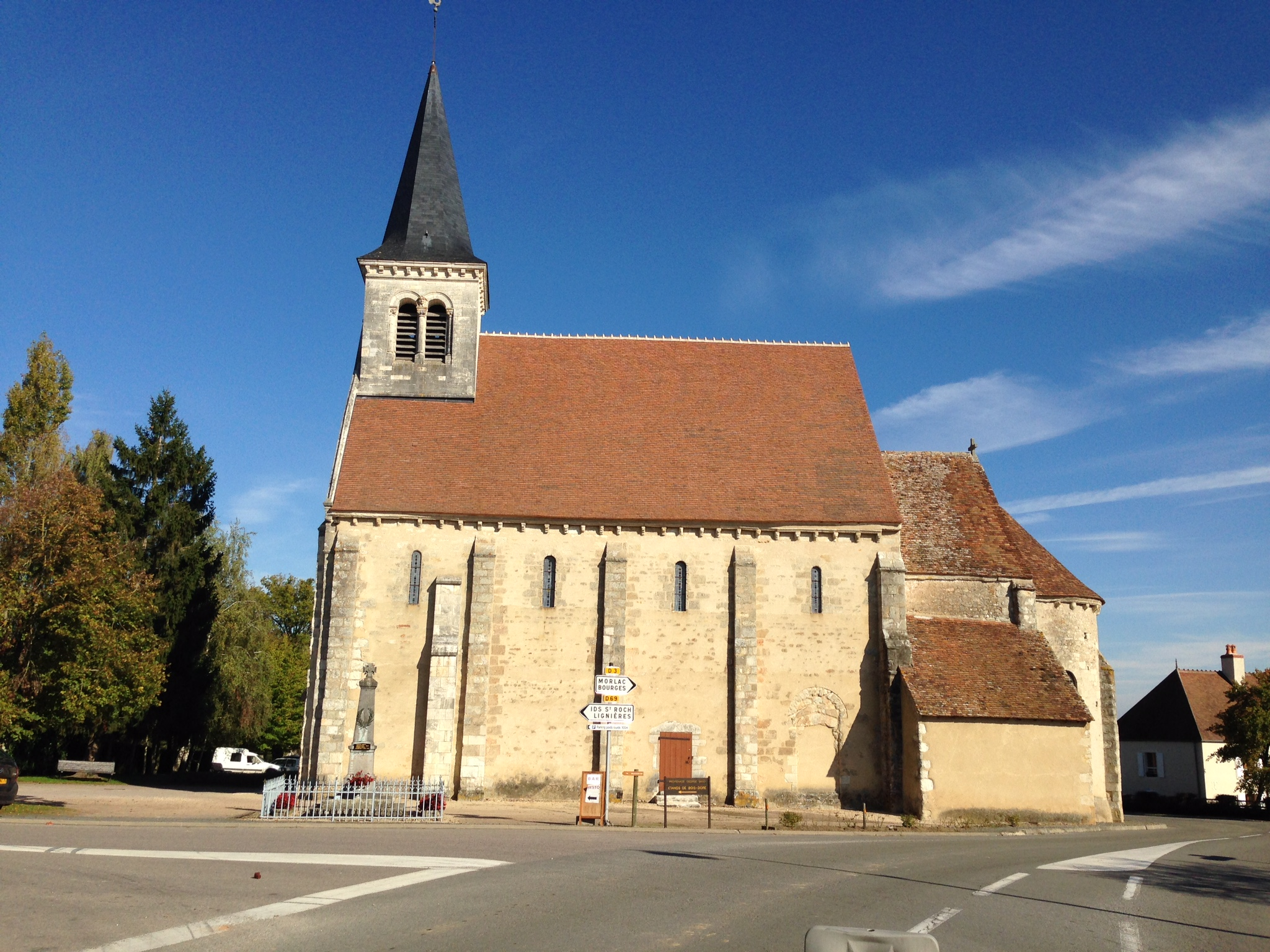 Saint-Pierre-les-Bois - l'église Saint-Pierre